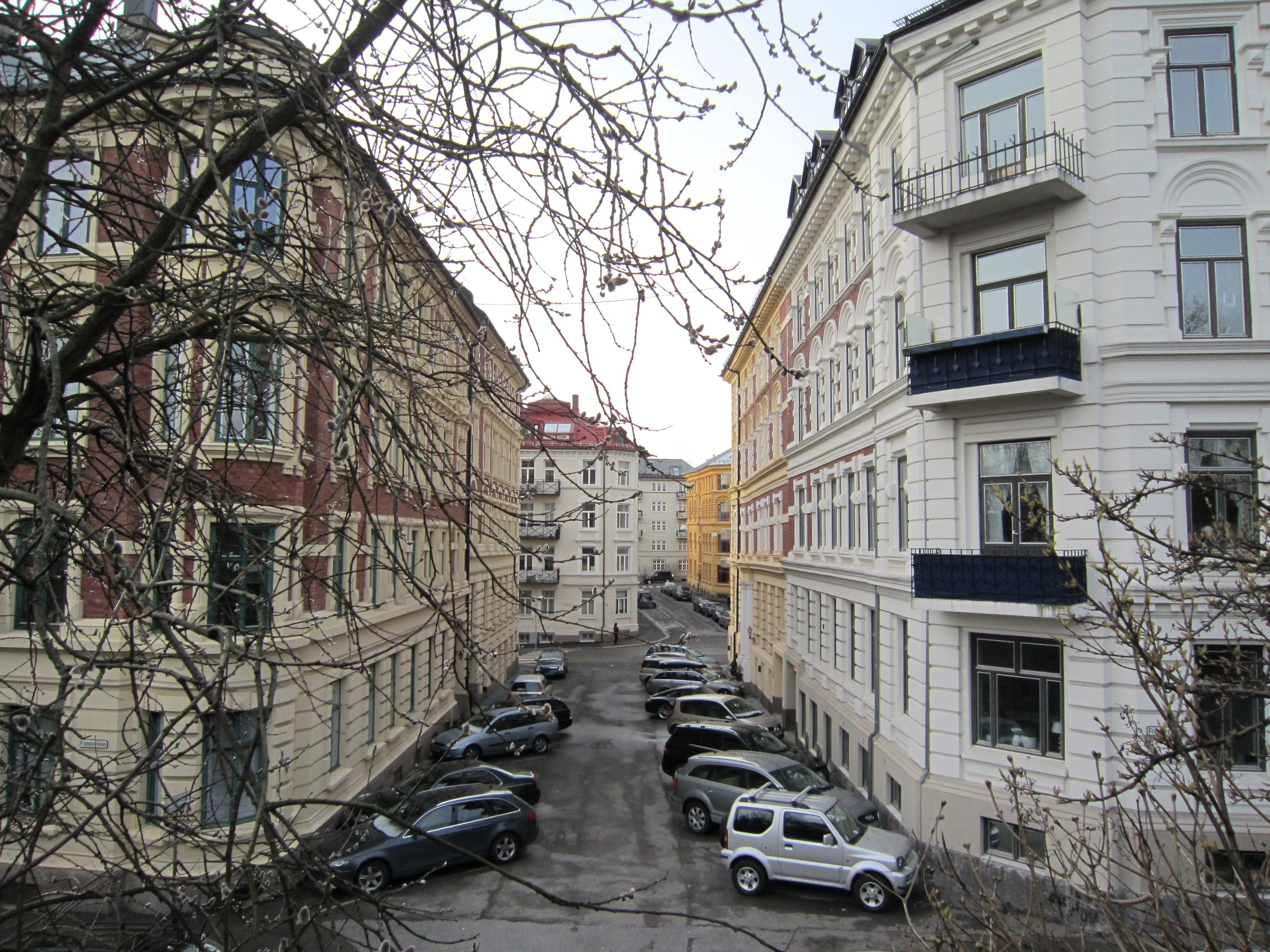 Terningbekk sett vestover fra Framnesveien